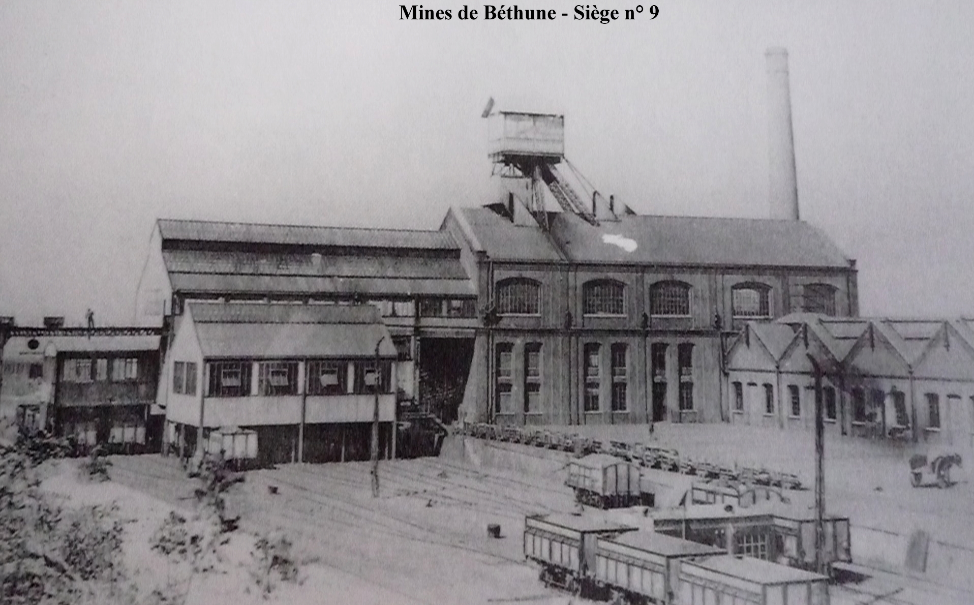 La Fosse n° 9 de la Compagnie des mines de Béthune était un charbonnage constitué d'un seul puits situé à Annequin, Pas-de-Calais, Nord-Pas-de-Calais, France.